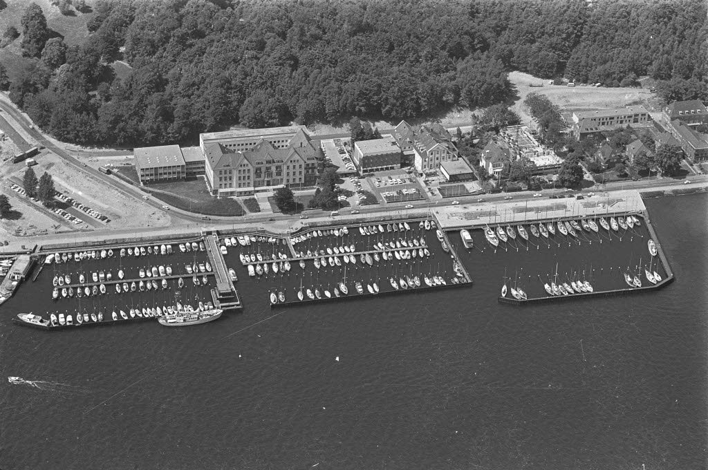 In der Bildmitte links das Institut für Weltwirtschaft (IfW), rechts daneben der Kieler Yacht-Club (KYC), sowie dahinter Düsternbrooker Weg.